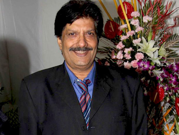 Anil Dhawan at Dr Tiwari's birthday bash